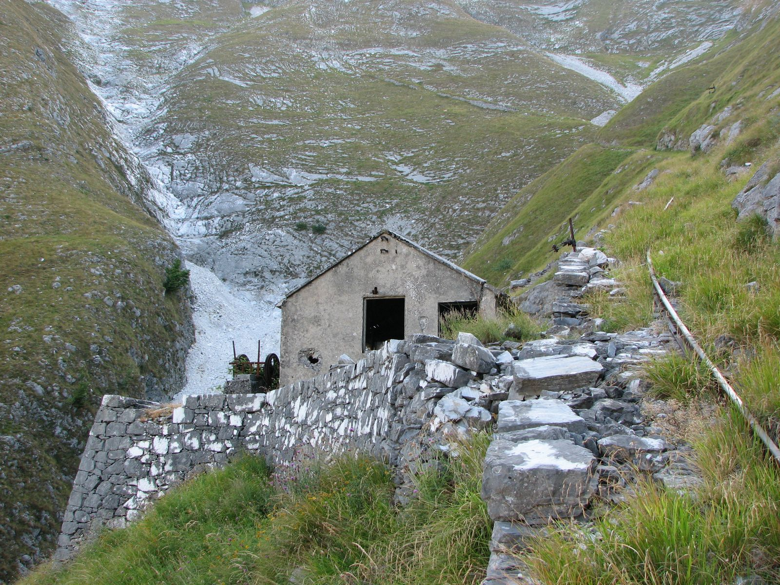 Altro edificio di servizio alla lizza, Alpi Apuane - Italia.